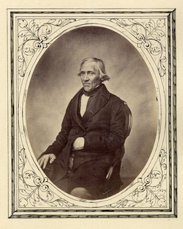 Kniestück des badischen Staatsmannes Christoph Trefurt (1790-1861).